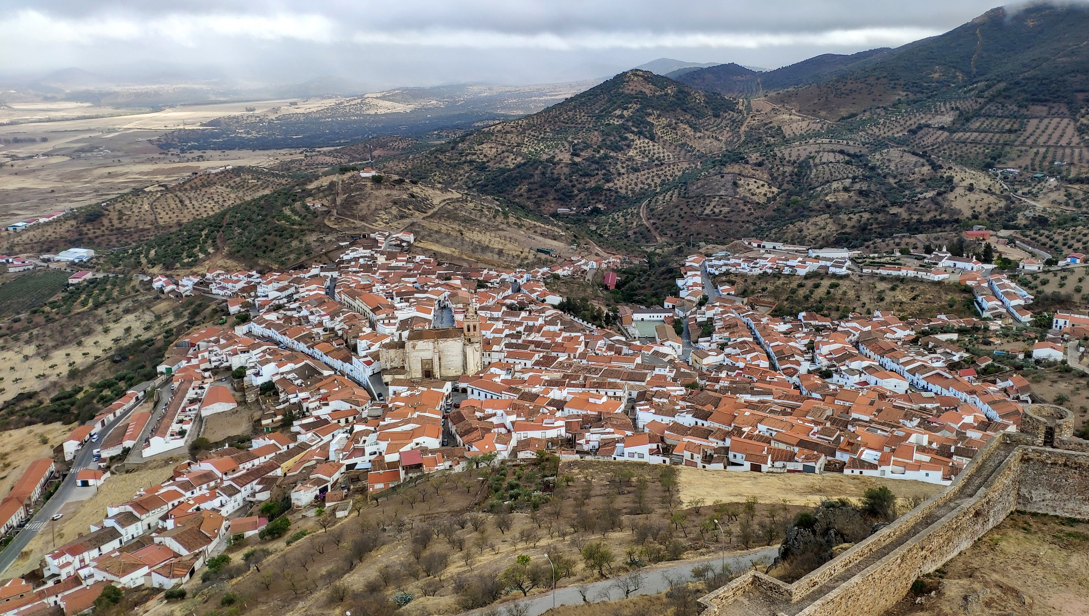 La localidad de Feria, Badajoz, desde su castillo